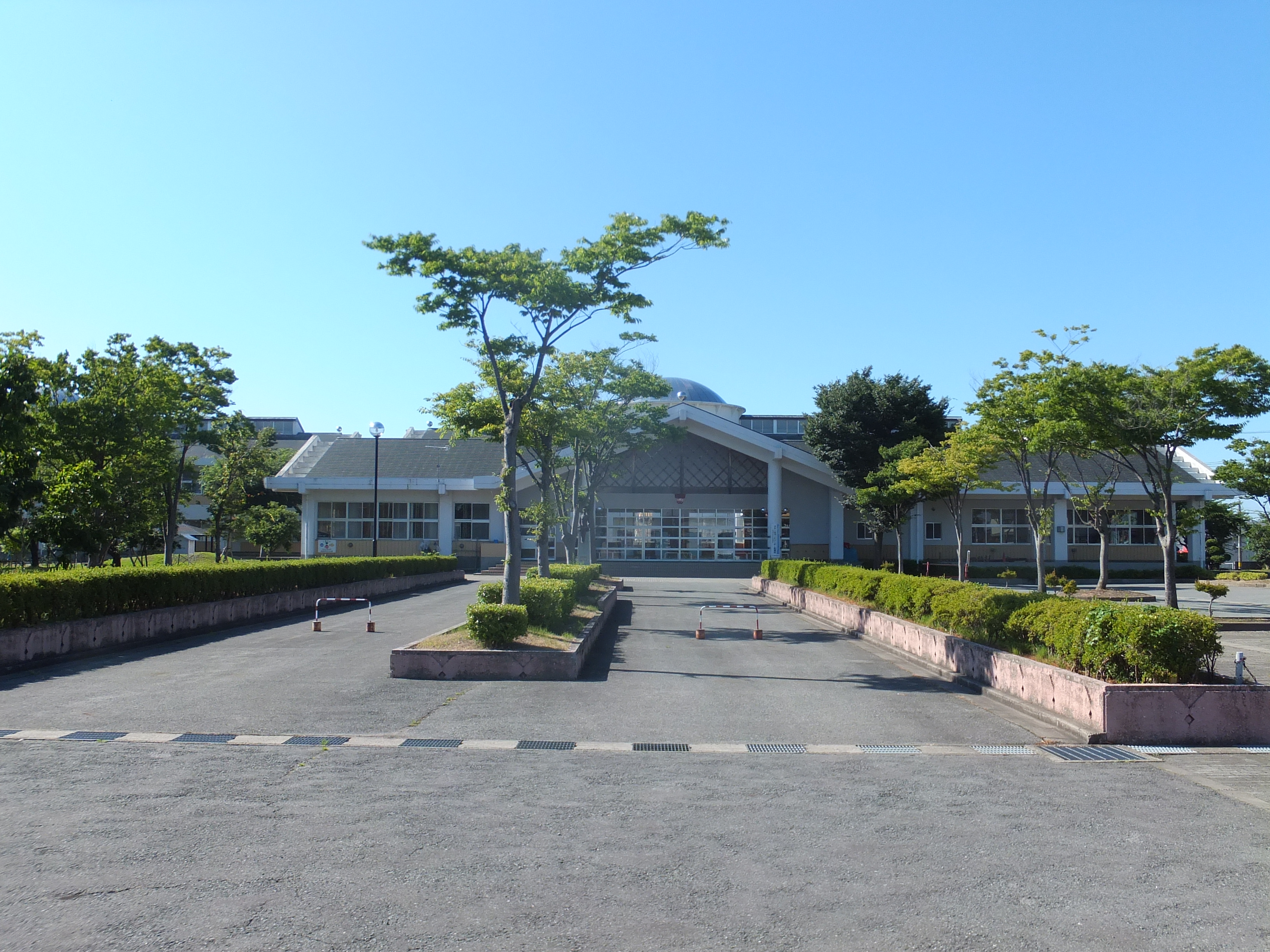 潟上市立大豊小学校。大久保小学校と豊川小学校の統合により2012年に開校した。